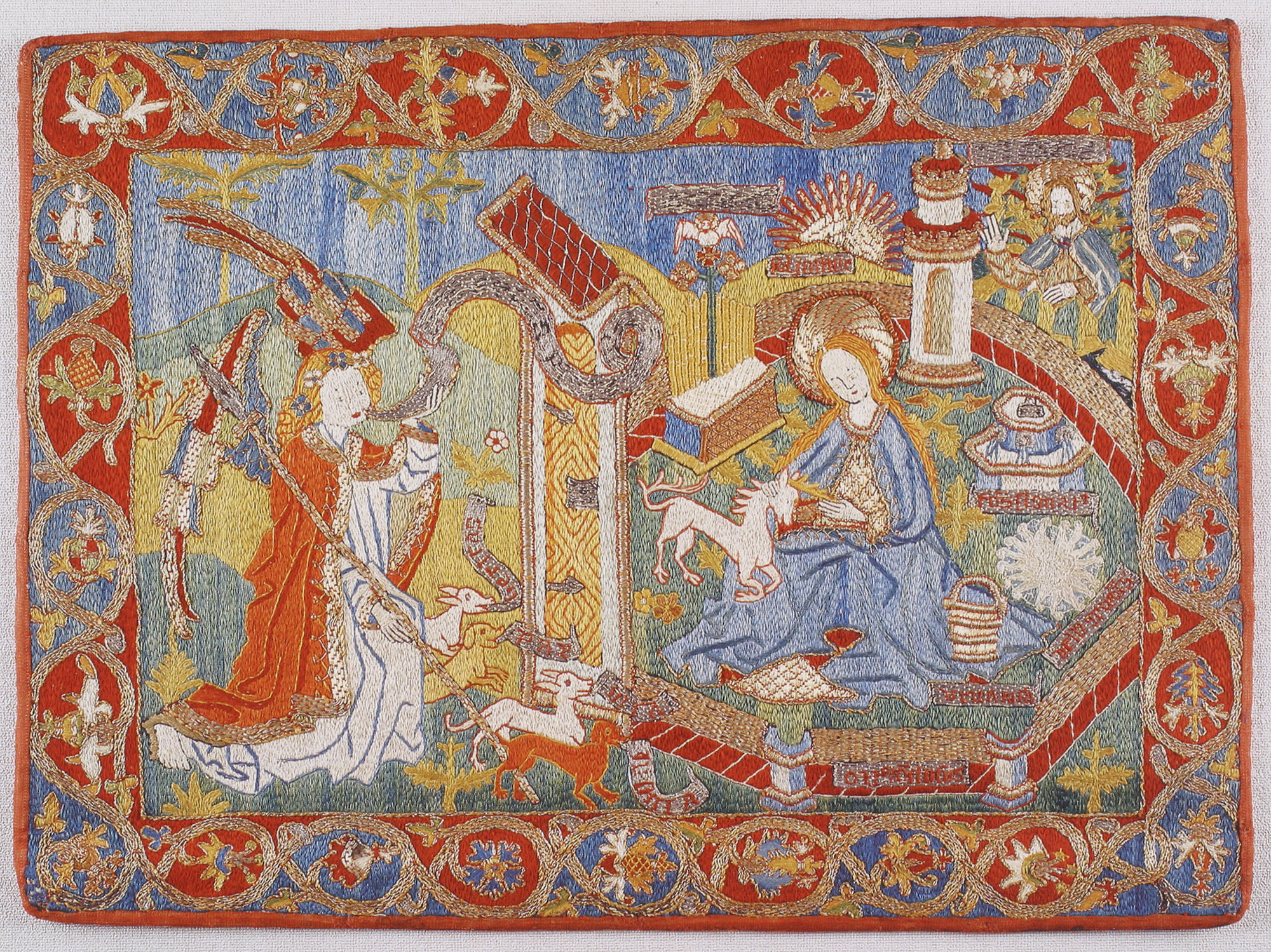 Lesepulttuch mit Einhornjagd und Hortus conclusus aus dem Benediktinerinnenkloster Ebstorf